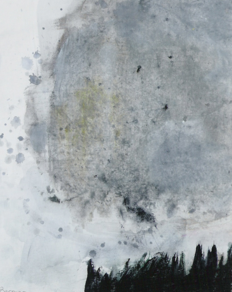 שמש אפורה.